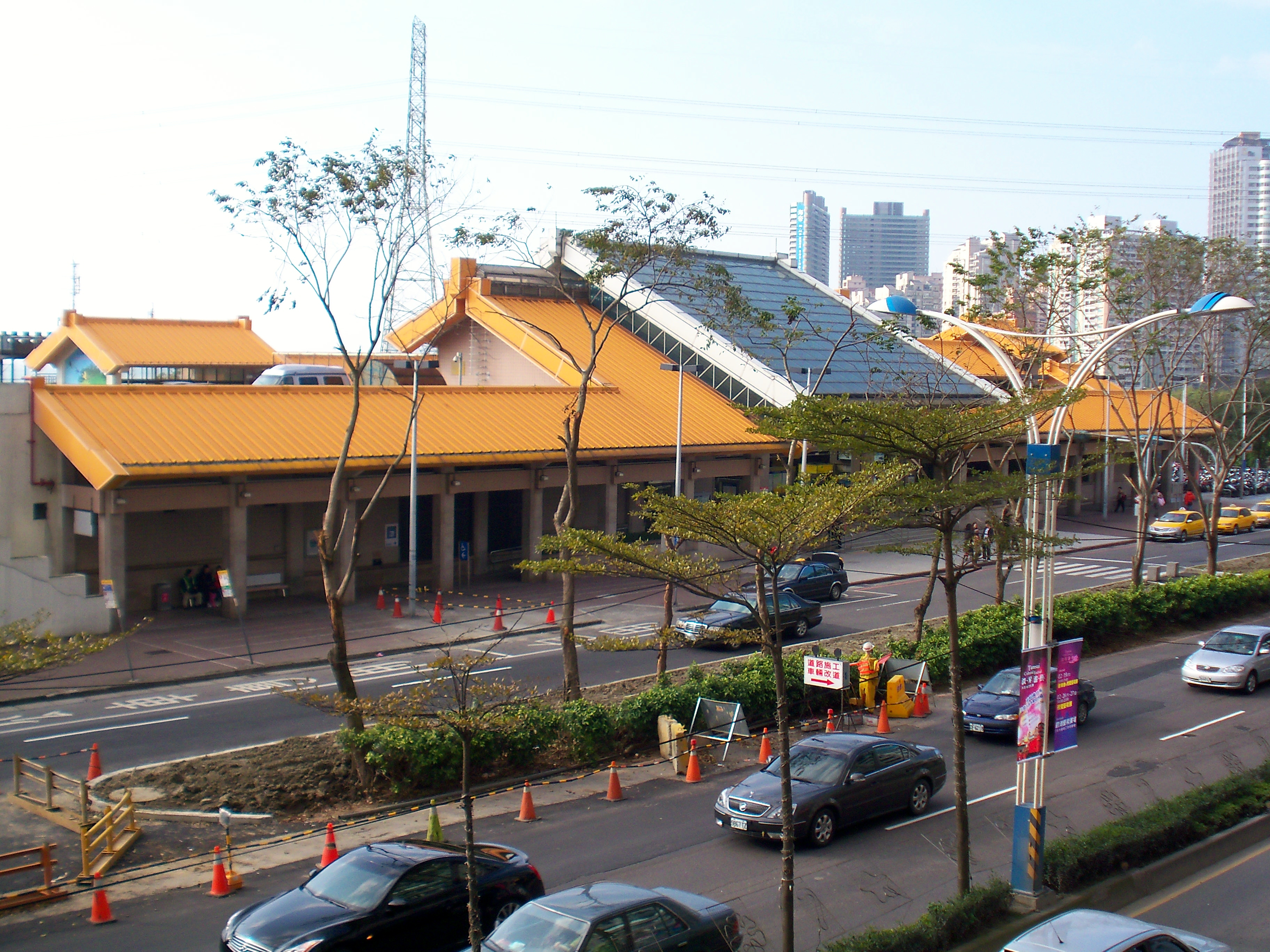 臺北捷運淡水線紅樹林站。